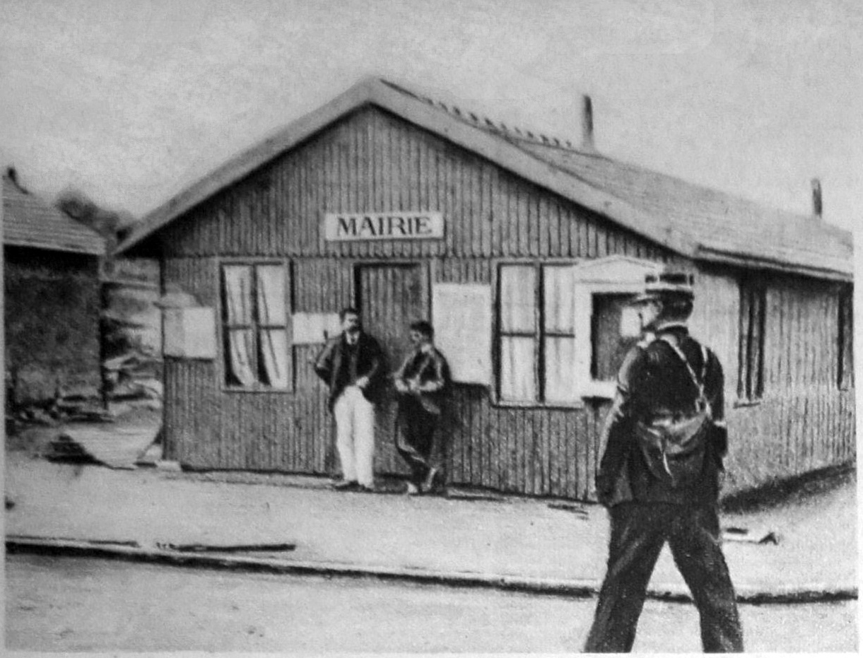 lE MIroir N°92 une rue de Sermaize, la mairie.